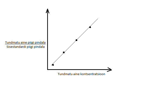 Näide kalibreerimisgraafikust kasutades sisestandardi meetodit